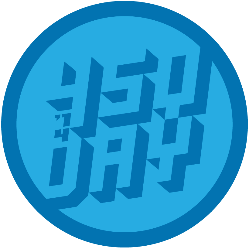 4sq Day 2014